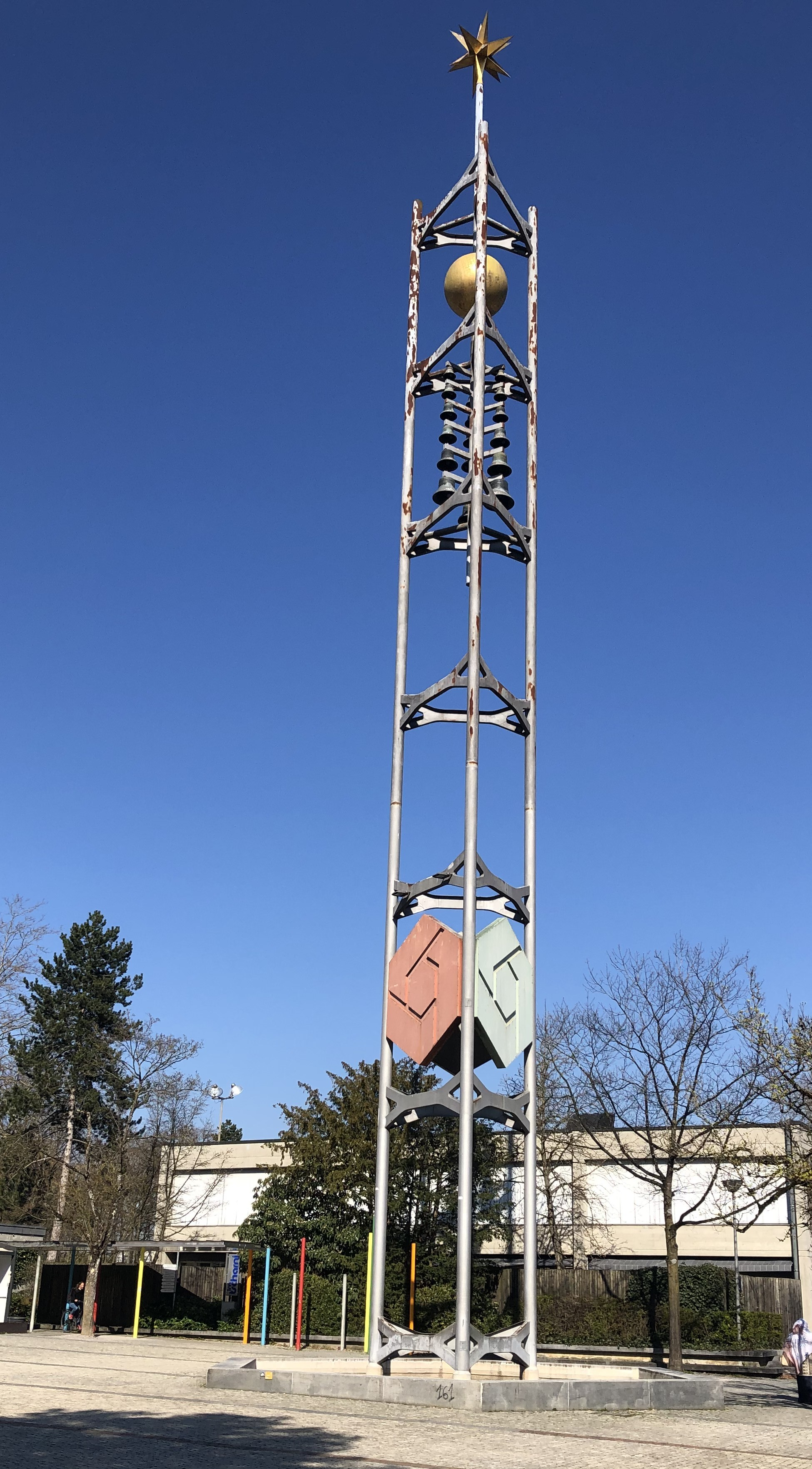 Tscharnergut Plaza Glockenturm